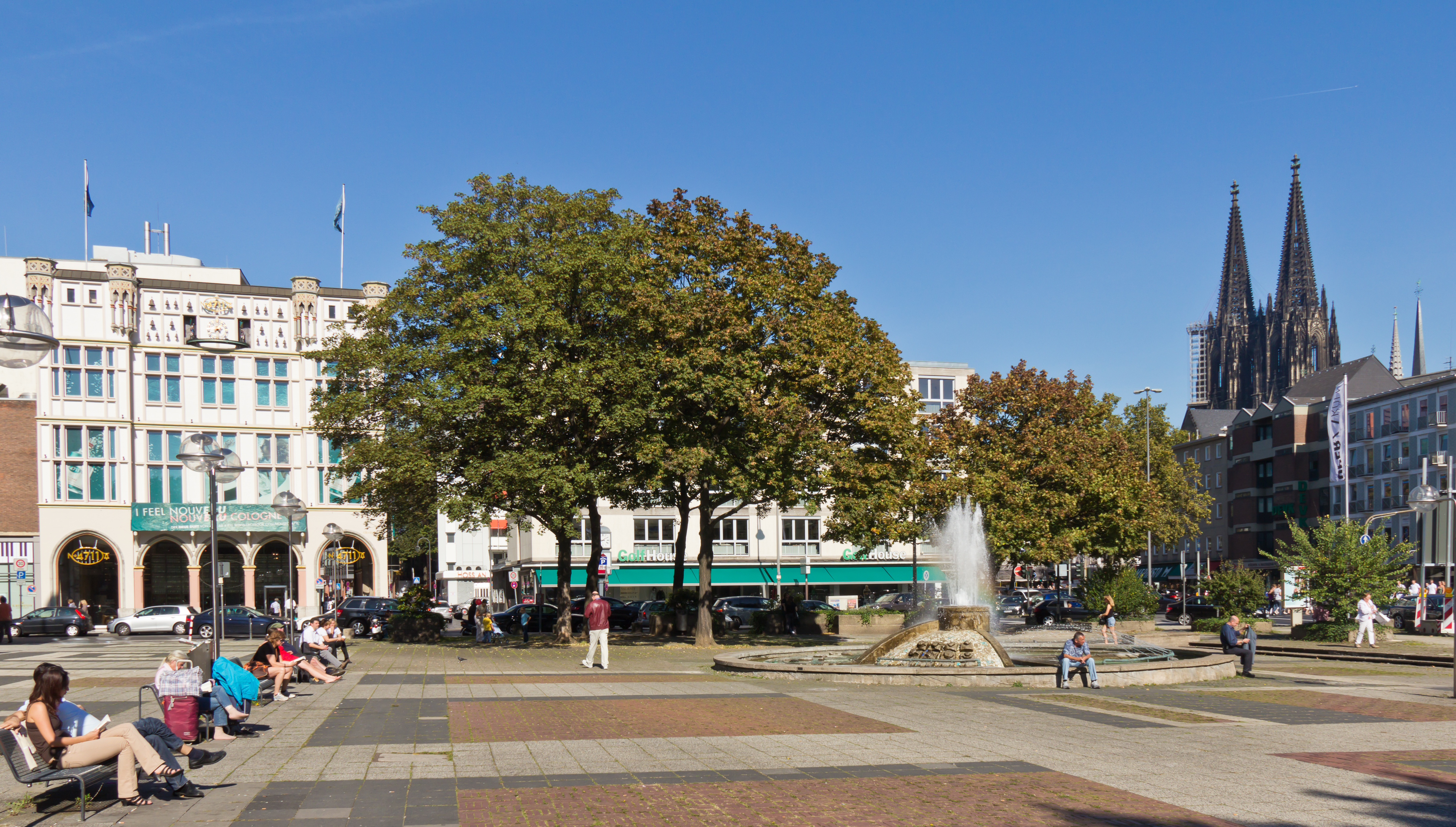 Offenbachplatz, Opernbrunnen und der Kölner Dom im Hintergrund This is a photograph of an architectural monument.